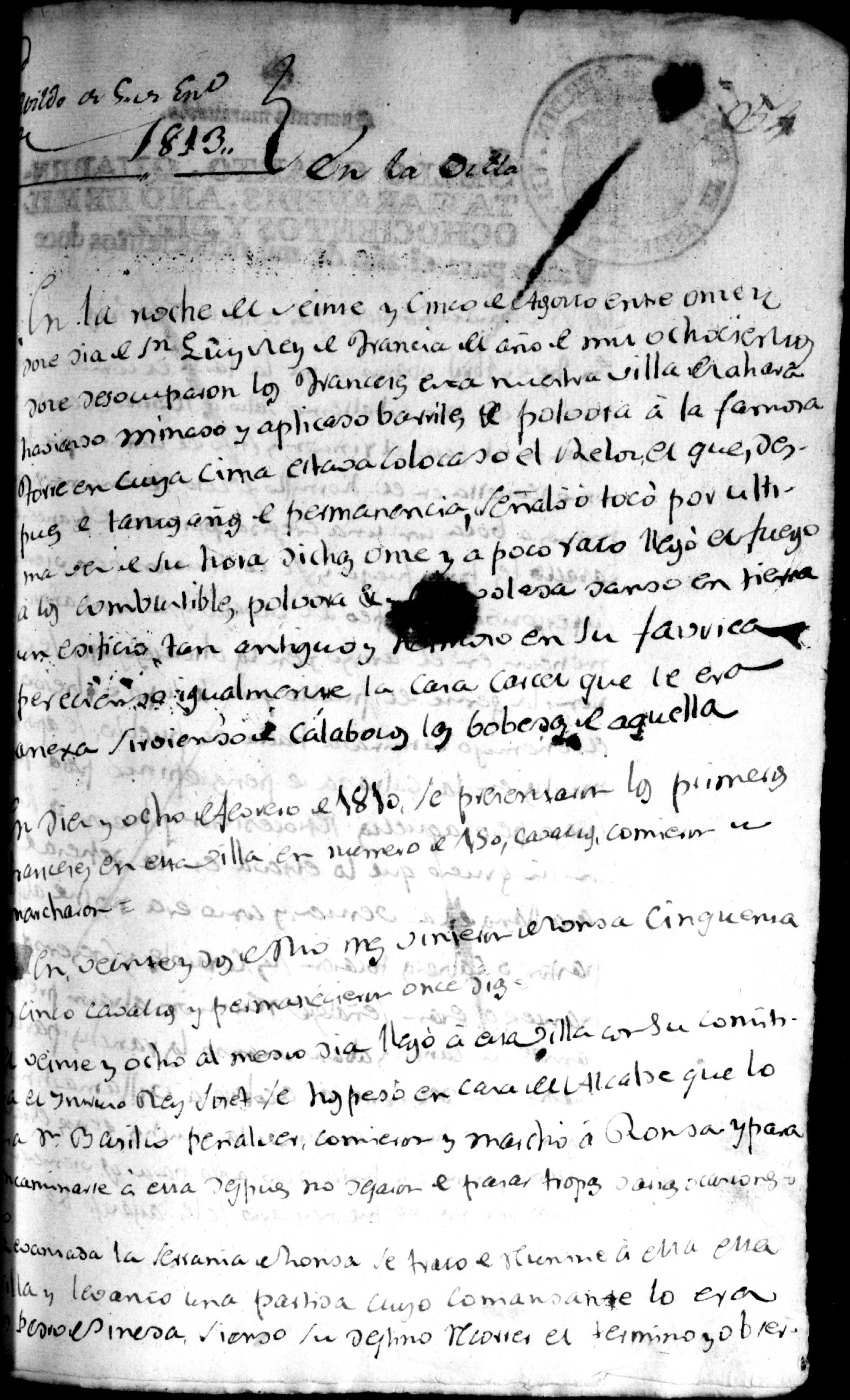 Acta capitular donde se describe la destrucción del Arco de la Villa